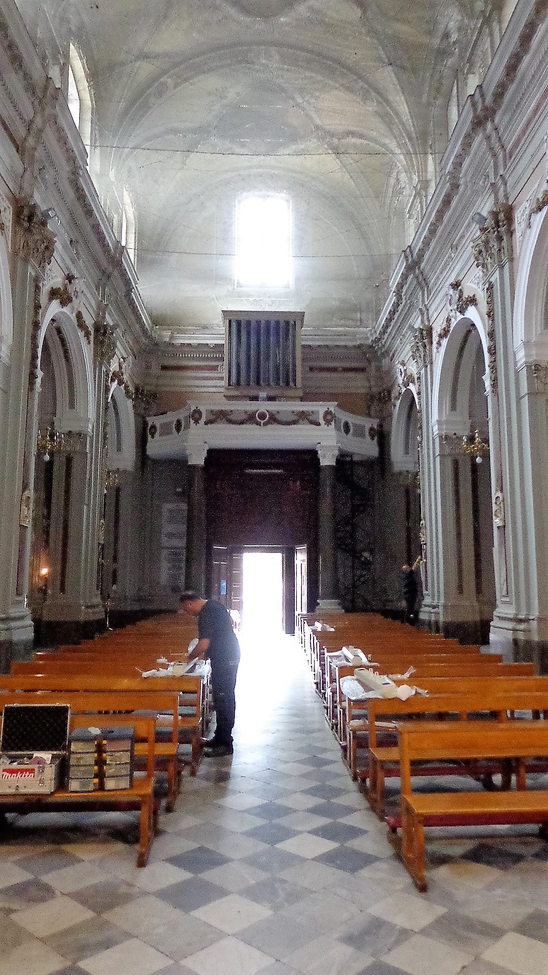 Controfacciata e coro.